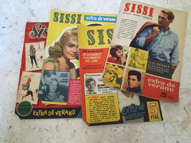 Selección de revistas Sissi.